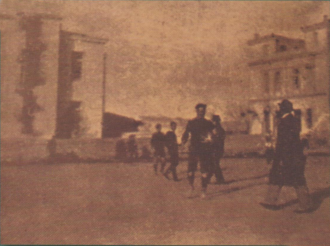 Το πρώτο γήπεδο του Παναθηναϊκού το 1908